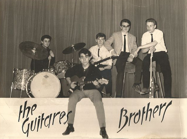 le groupe des débuts de sheila